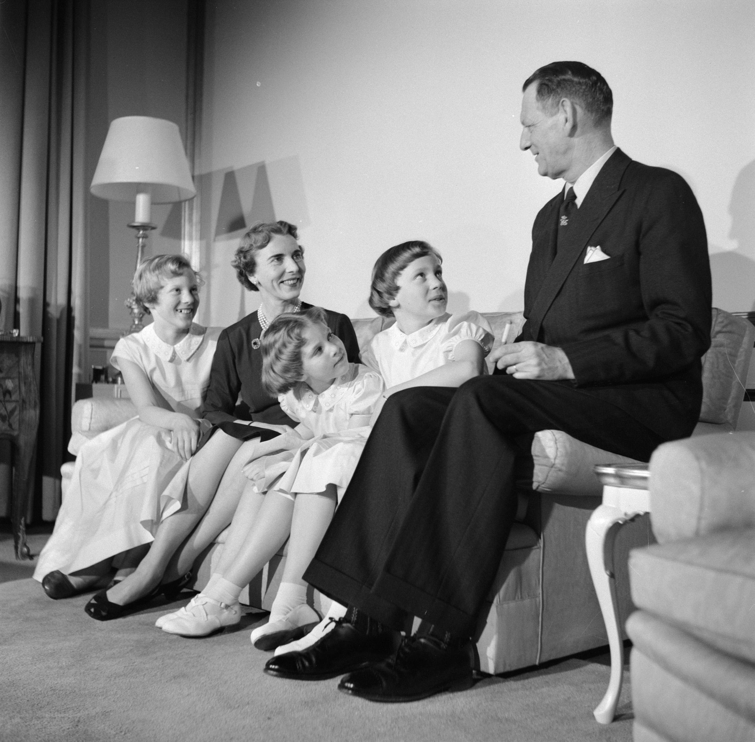 Collectie / Archief : Fotocollectie Van de Poll Reportage / Serie : Gezinsfoto's van de Deense koninklijke familie Beschrijving : Het Deense Koninklijk gezin in hun woning in paleis Brockdorff in Slot Amalienborg Datum : maart 1954 Locatie : Denemarken, Kopenhagen Trefwoorden : gezinnen, interieurs, koningen, koninginnen, prinsessen Persoonsnaam : Anne Marie (prinses Denemarken), Benedikte (prinses Denemarken), Frederik IX (koning Denemarken), Ingrid (koningin Denemarken), Margrethe (kroonprinses Denemarken) Fotograaf : Poll, Willem van de, [onbekend] Auteursrechthebbende : Nationaal Archief Materiaalsoort : Negatief (zwart/wit) Nummer archiefinventaris : bekijk toegang 2.24.14.02 Bestanddeelnummer : 252-8587